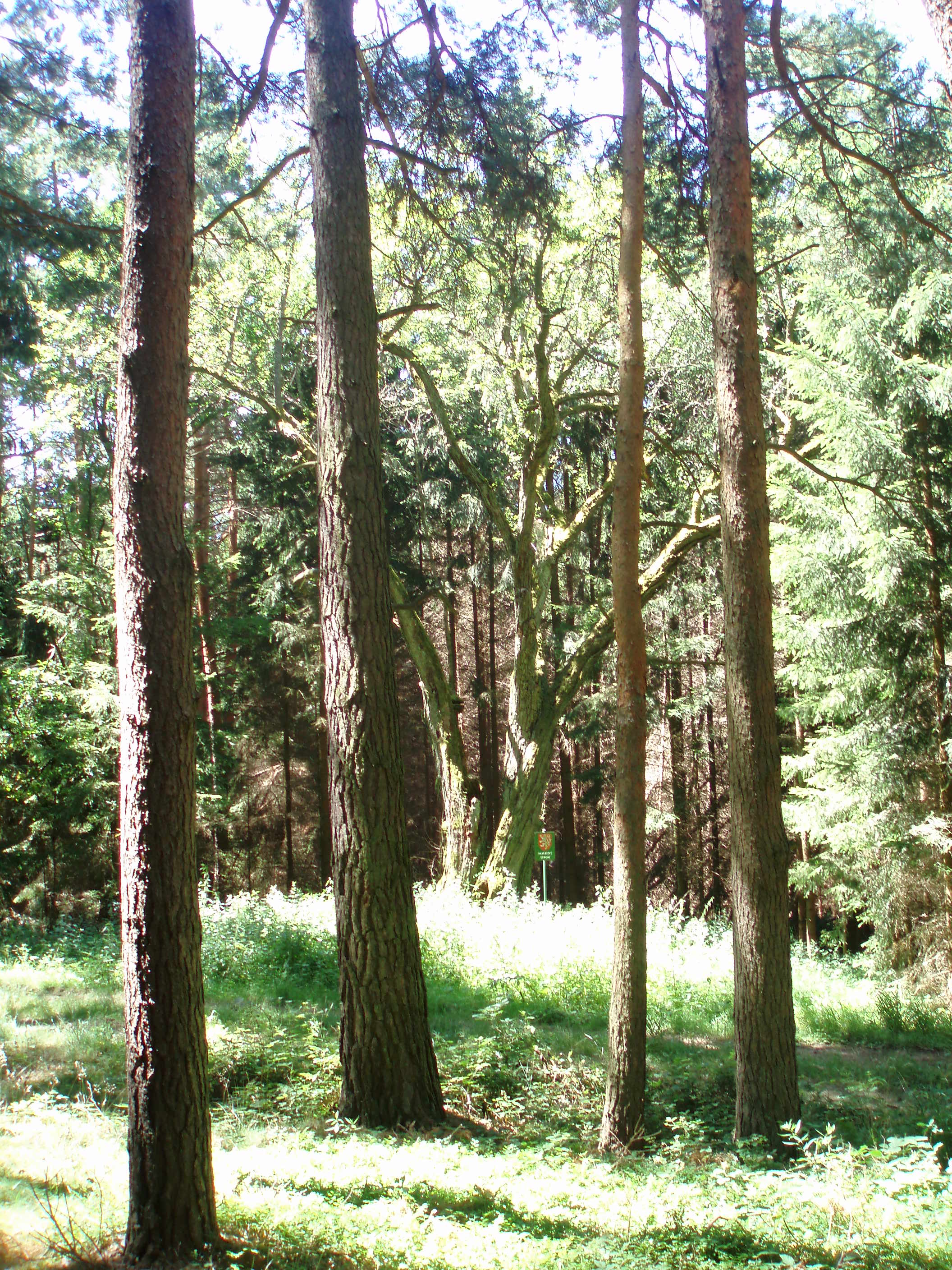 Pastýřova hruška, památná hrušeň v lese nad obcí Únějovice, okres Domažlice. U této údajně došlo k založení obce. Původně stála na planině, les kolem je náletový.